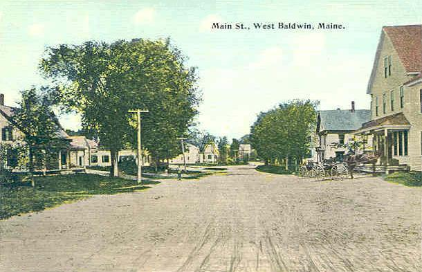 Street Scene, West Baldwin, ME